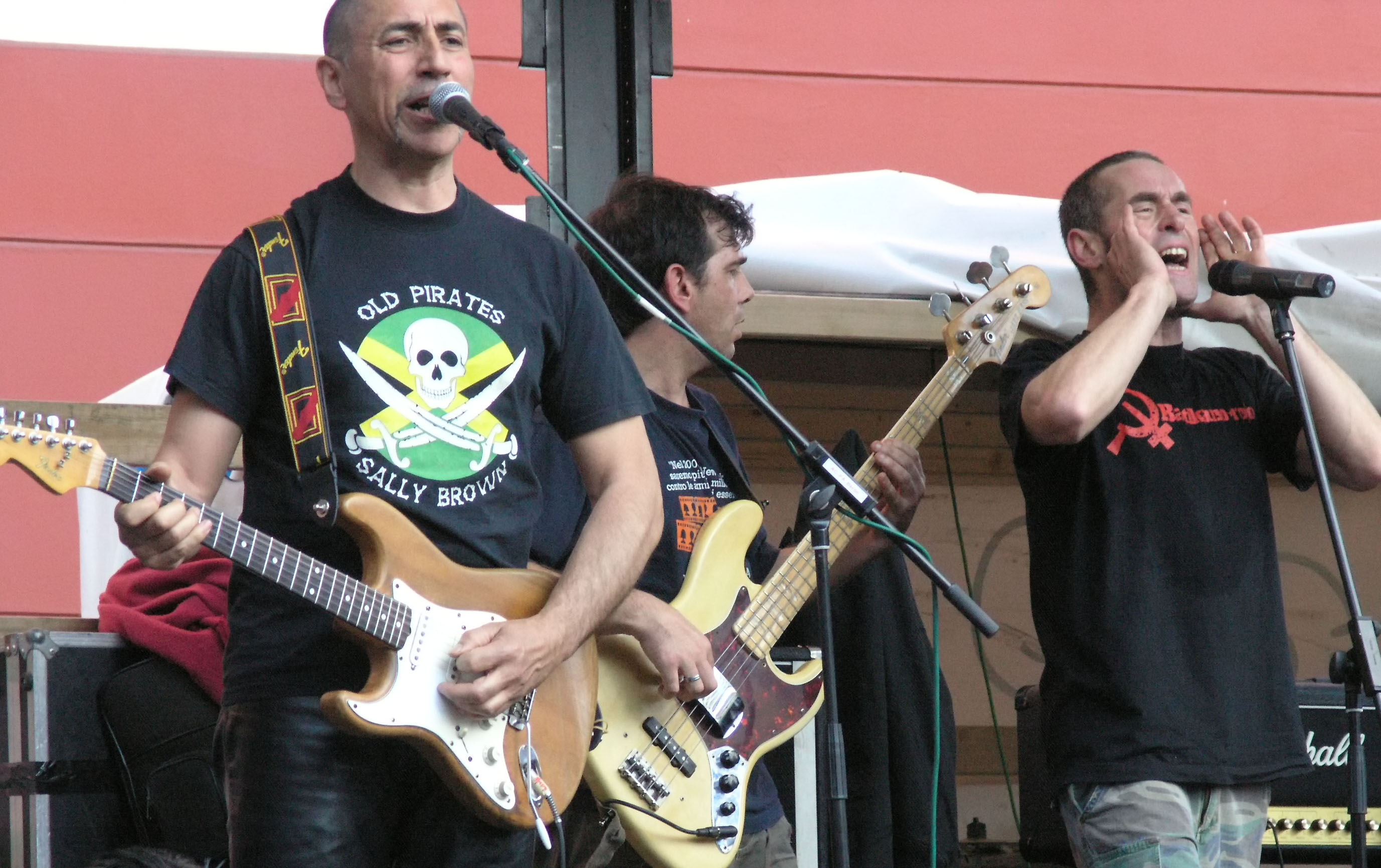 Die italienische Ska-Punk-Band Banda Bassotti am 1. Mai 2008 auf der Myfest-Bühne Beats against fascism am Kottbusser Tor, ca. 18:30. Fabio „Scopa“ Santarelli, Michele Frontino, Gian Paolo „Picchio“ Picchiami (v. l. n. r.)